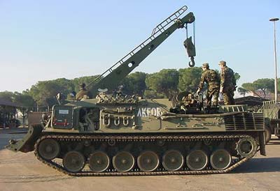 Carro armato leopard, vers.pioniere, Esercito italiano